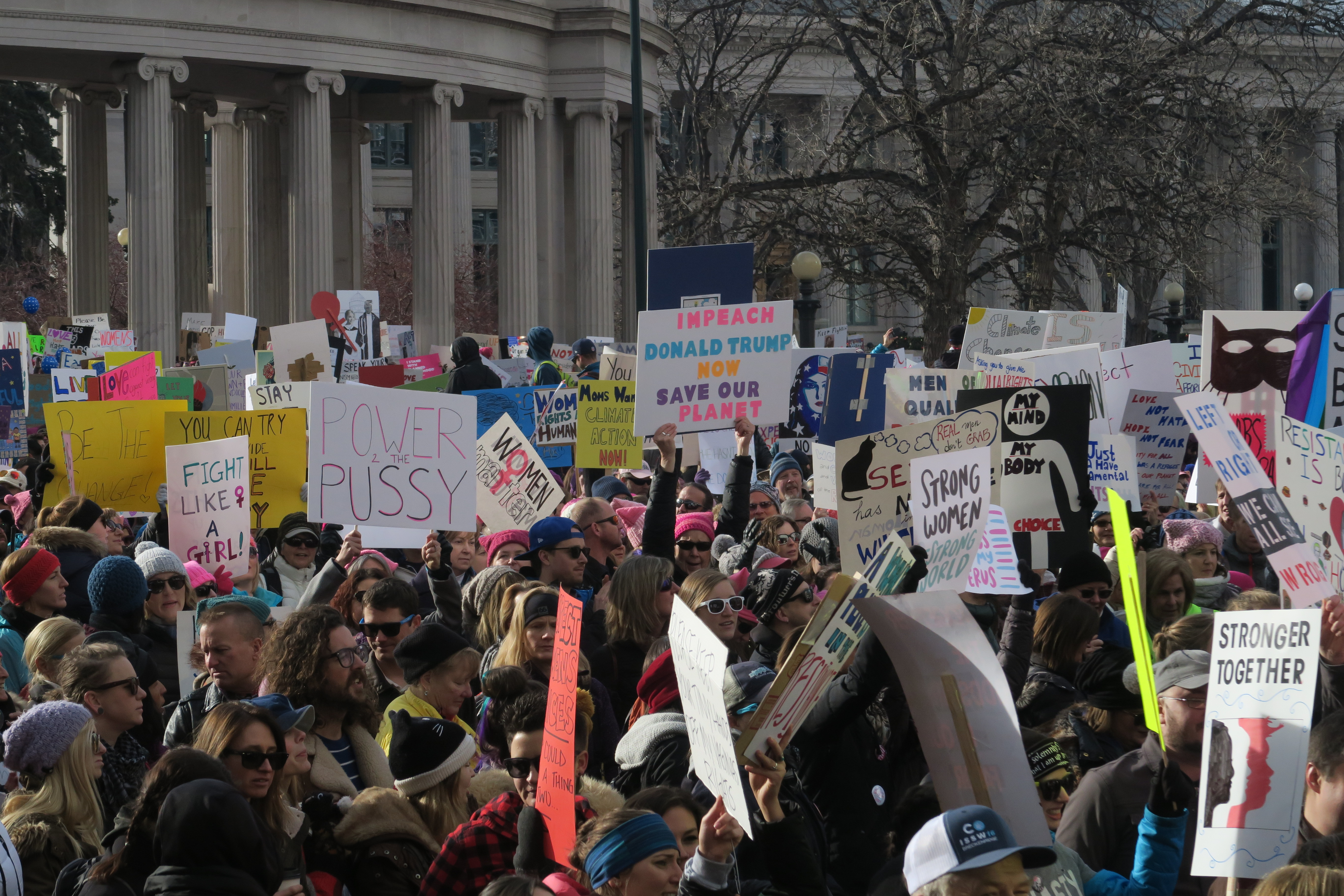 Women's March In Denver